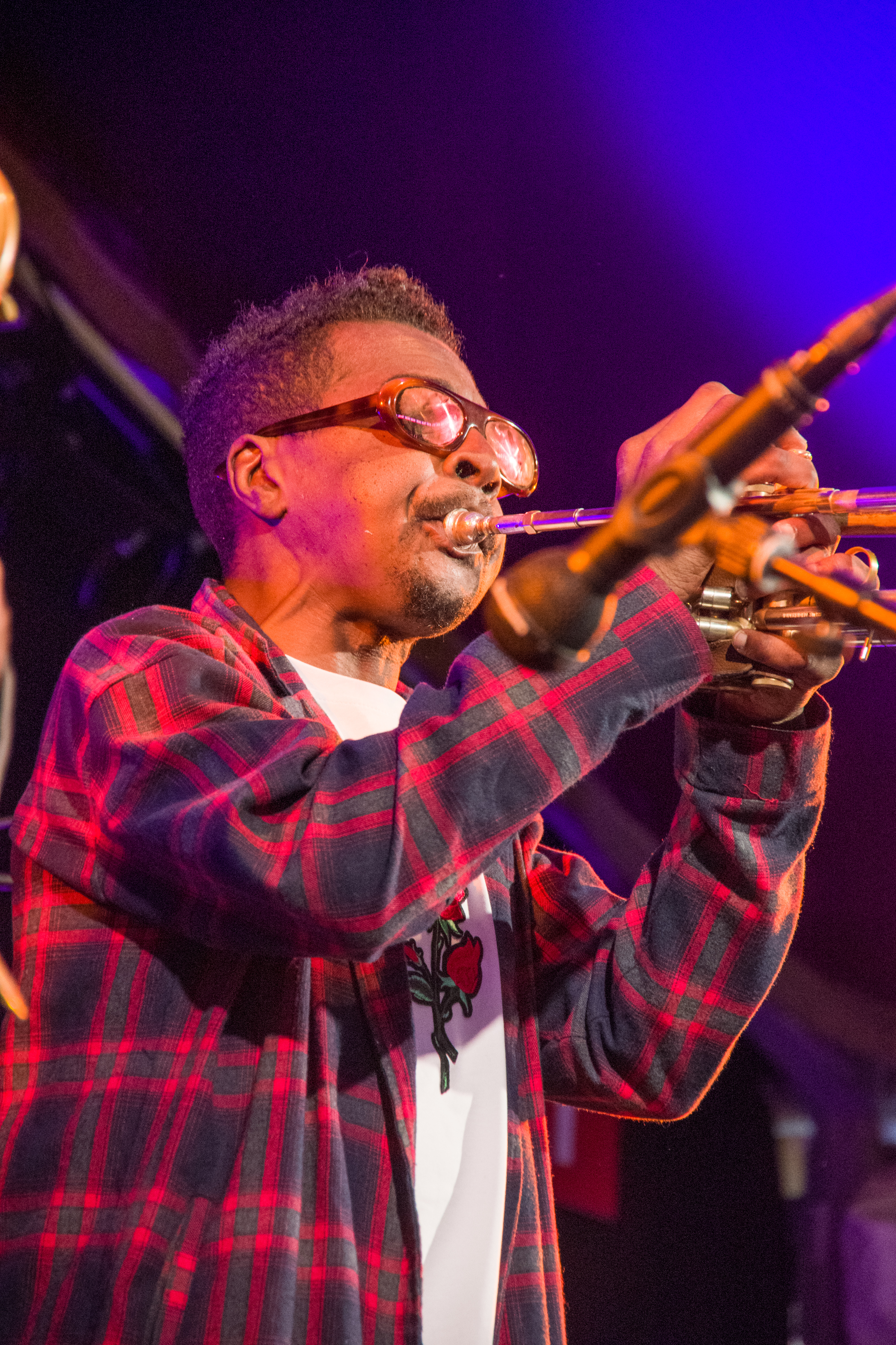 Das Zelt-Musik-Festival 2018 in Freiburg im Breisgau 20.07.2018 Roy Hargrove Quintet